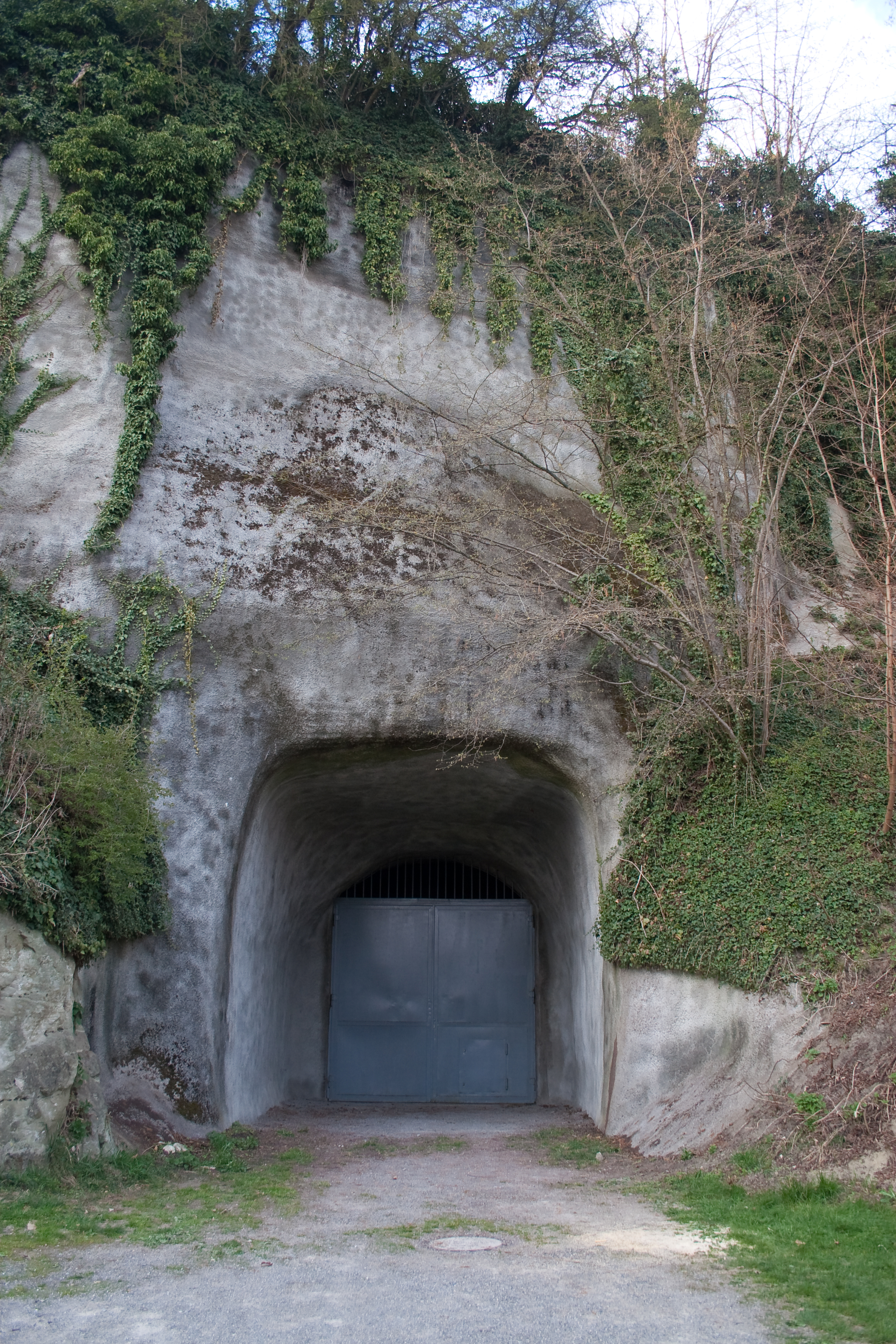 Überlingen, Baden-Württemberg, Germany